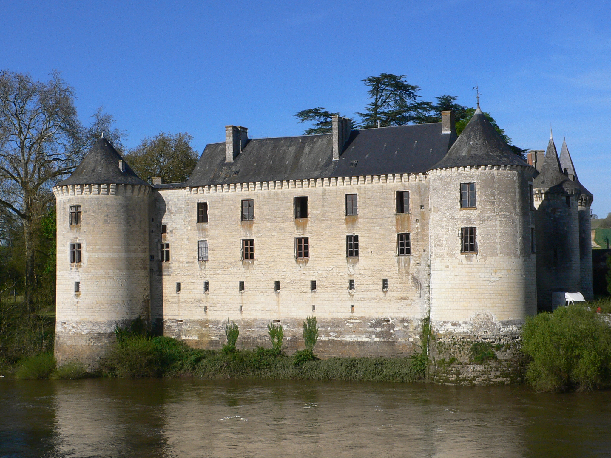 Château de La Guerche, au bord de la Creuse